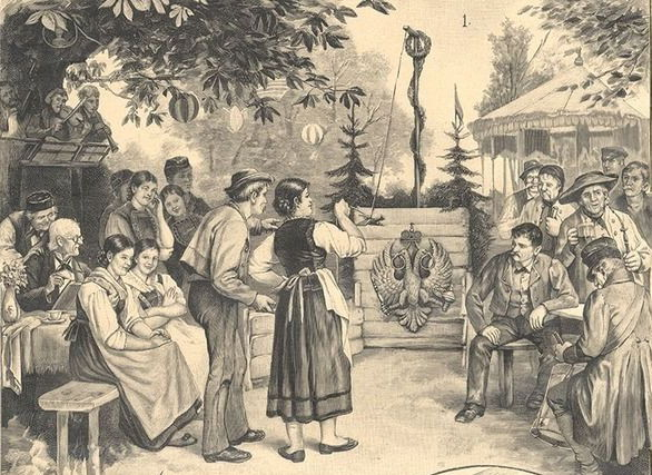 Stechvogelschießen